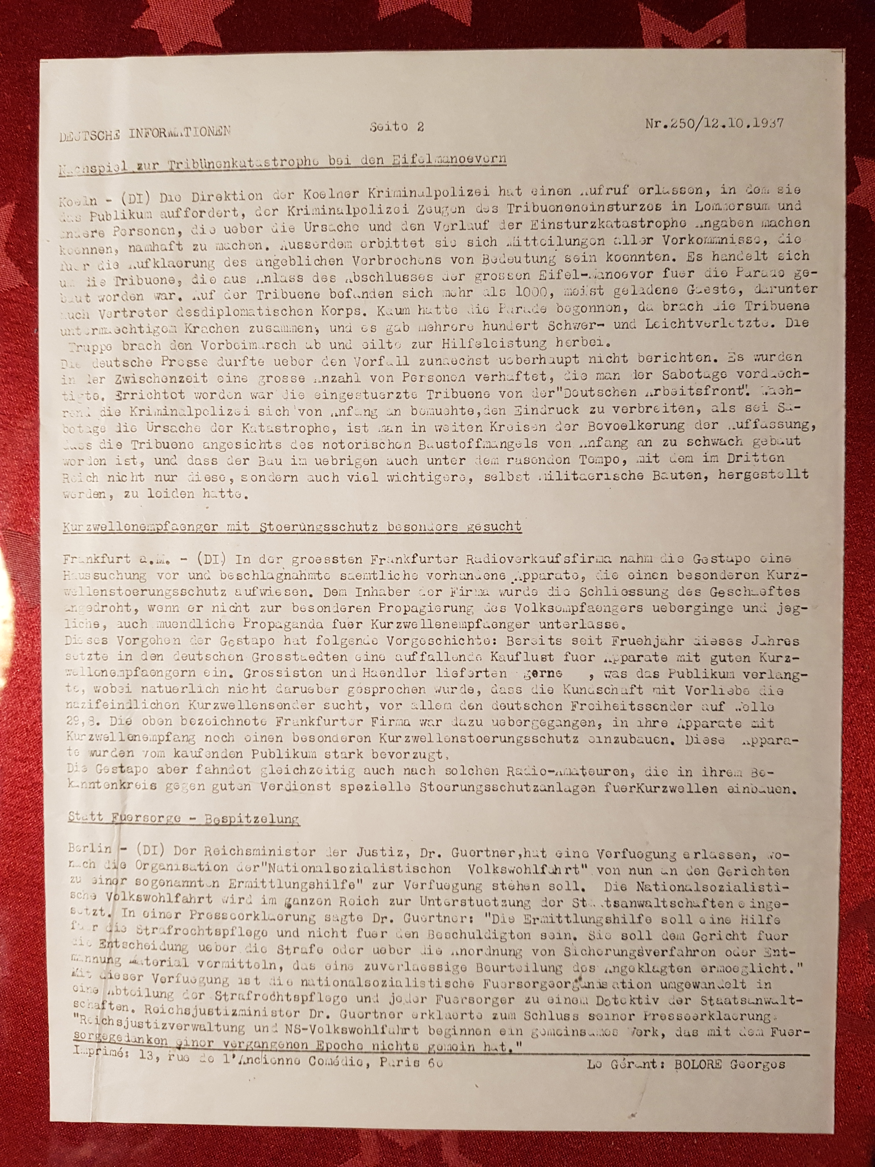 Hier wird berichtet von - der Tribünenkatastrophe bei LOMMERSUM am Ende der Eifelmanöver. - den gesuchten Kurzwellenempfängern mit Stoerungsschutz. - der Bespitzelung durch die "Nationalistische Volkswohlfahrt", die künftig als sogenannte Ermittlungshilfe den Gerichten dienen soll.